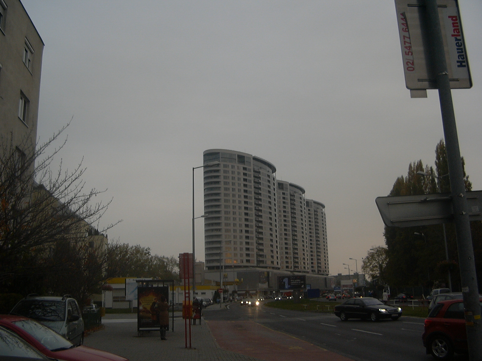 III Veže - pondelok, 7. november 2011